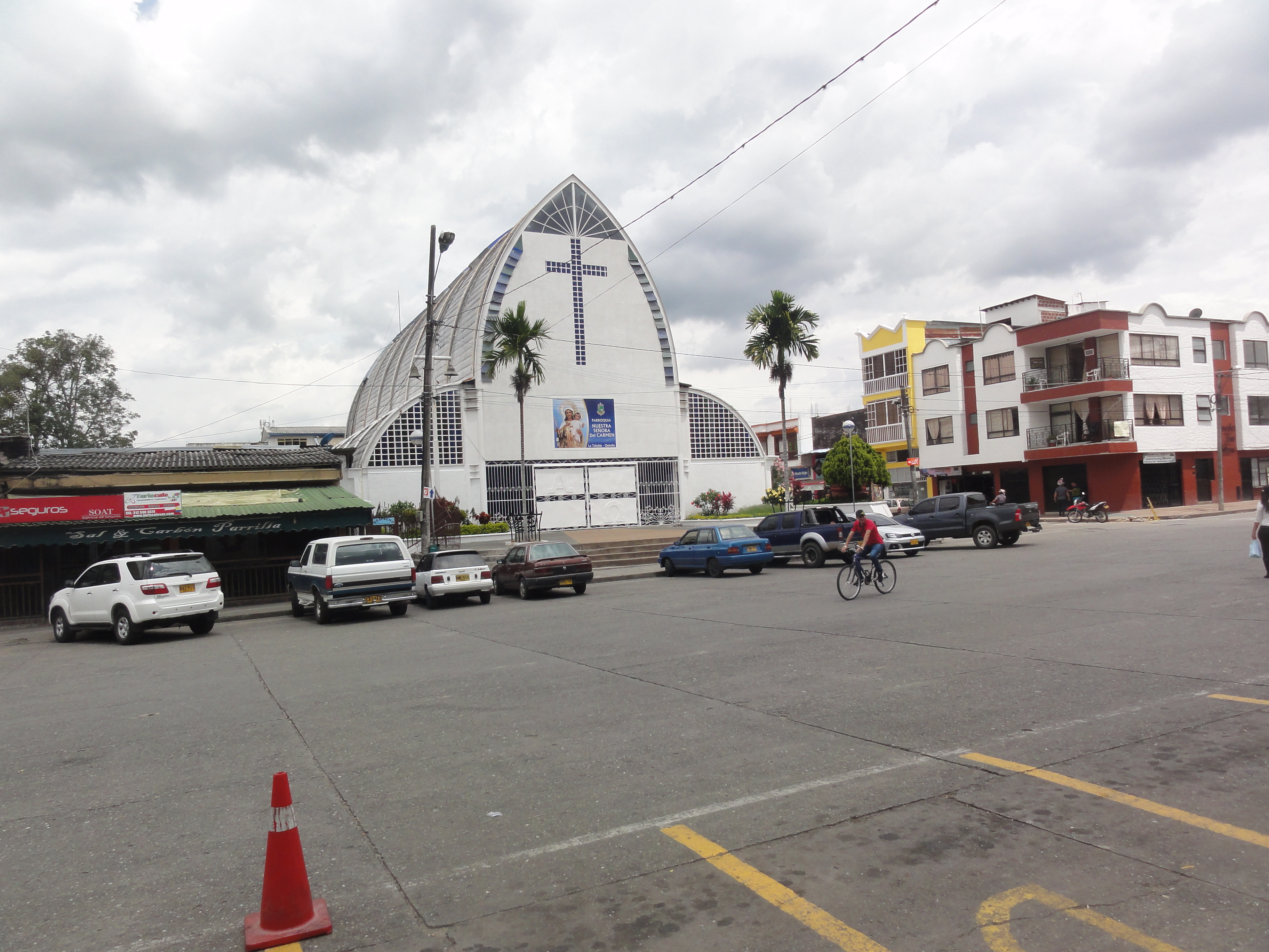 Iglesia Nuestra Señora del Carmen del municipio de La Tebaida, Quindío, Colombia.